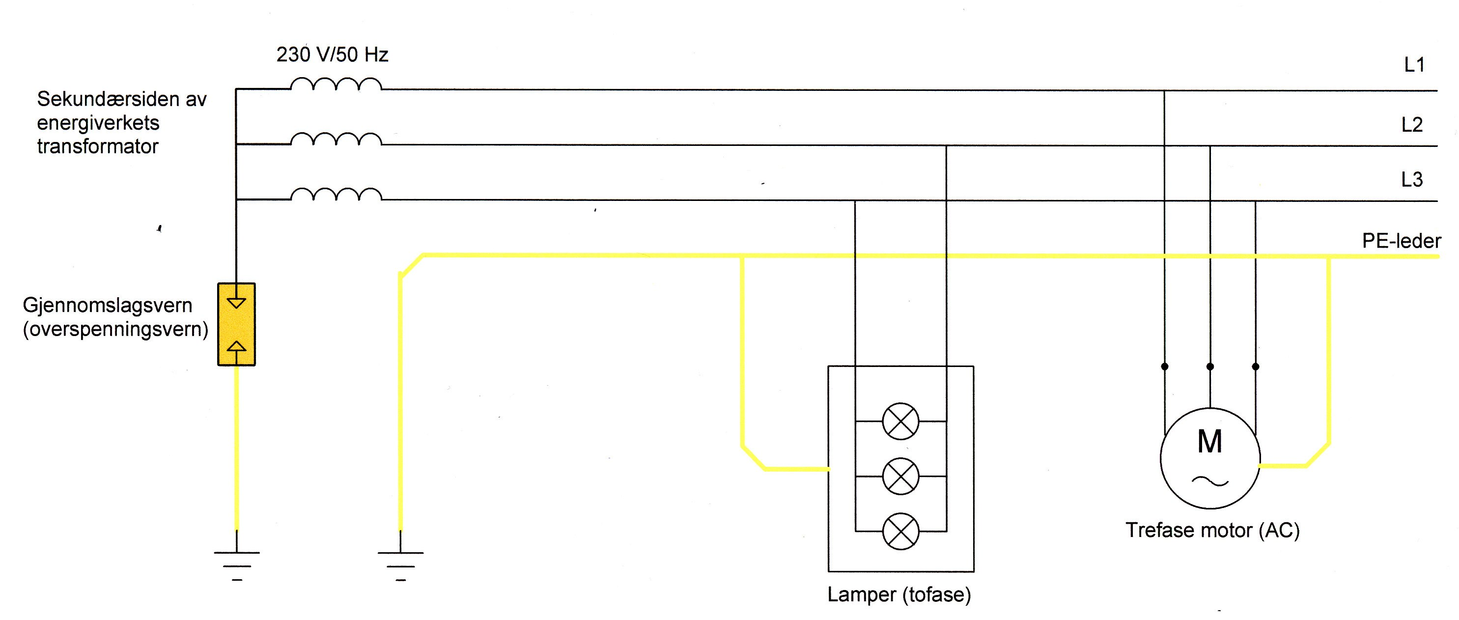 Bildet viser hvordan et IT-fordelingssystem er bygd opp.